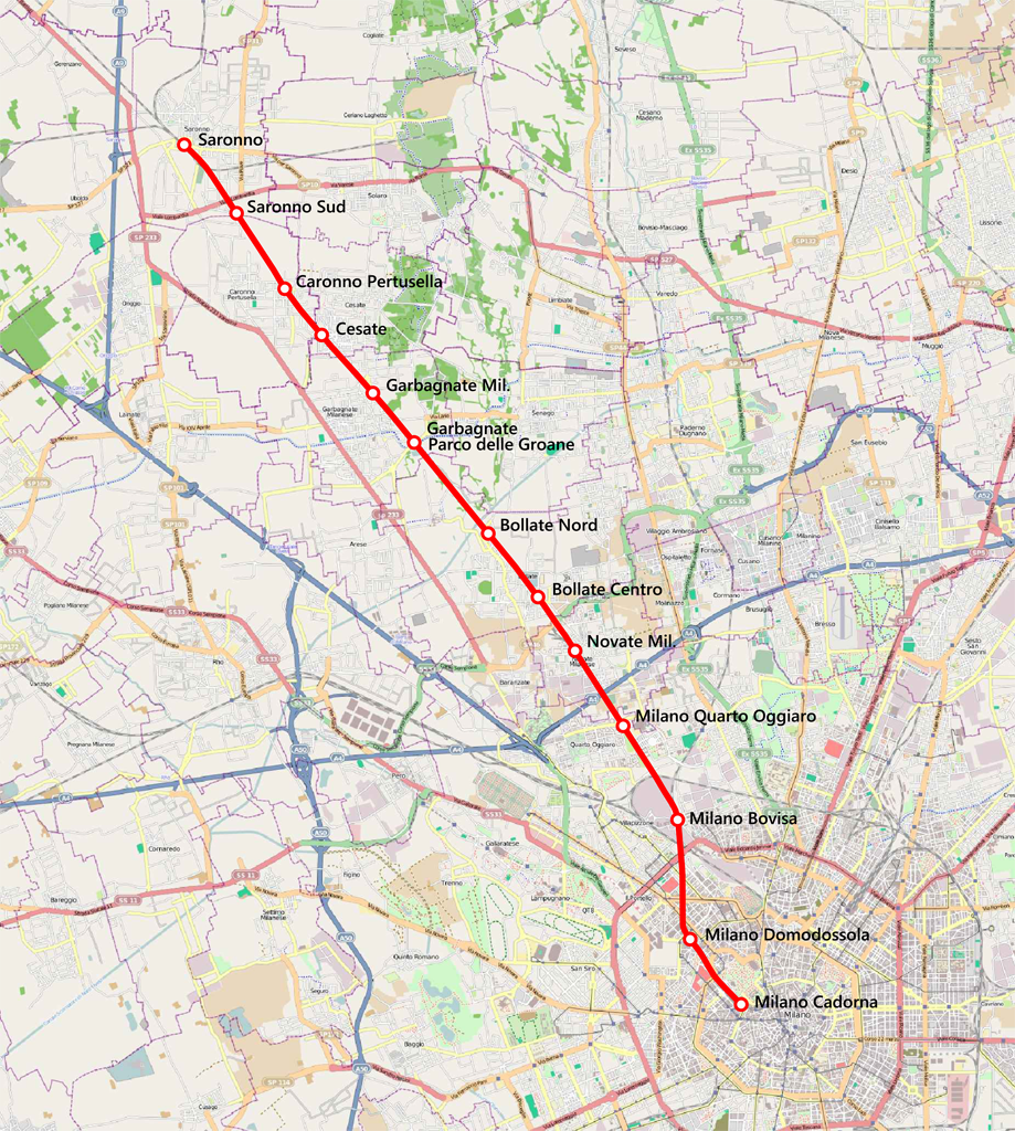 Mappa della ferrovia Milano-Saronno